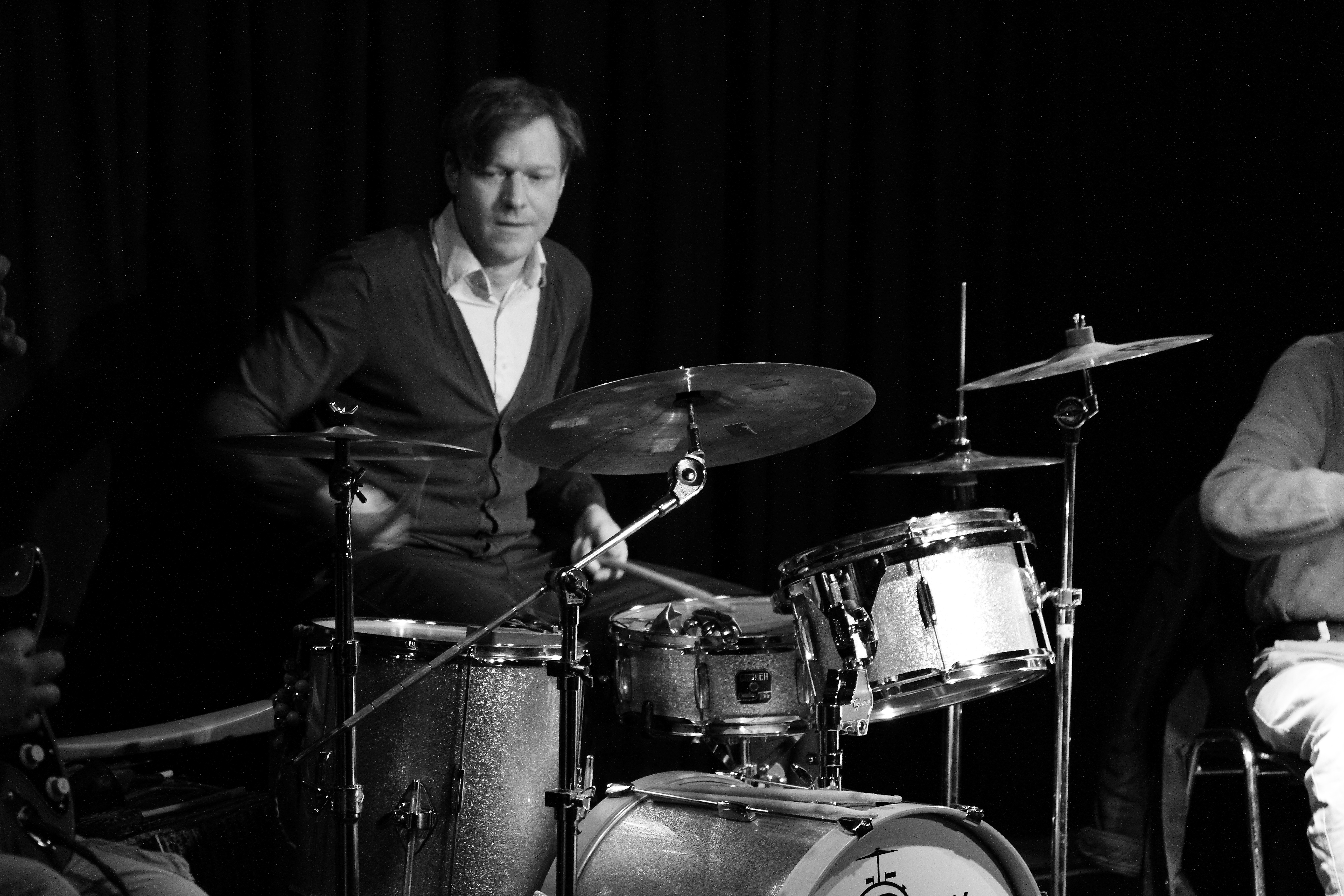 Oliver Steidle mit HDRS im Club W71, Weikersheim.